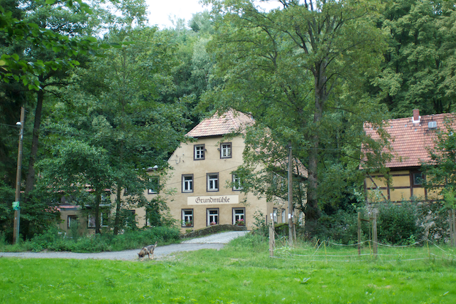 Ansicht von vorn, Grundmuehle (Radeberg), Deutschland, Sachsen (rechts das Bäckerhaus, links die Grundmühle)